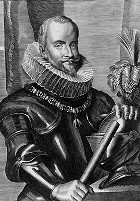 Ambrosio Spinola, según un grabado de la época